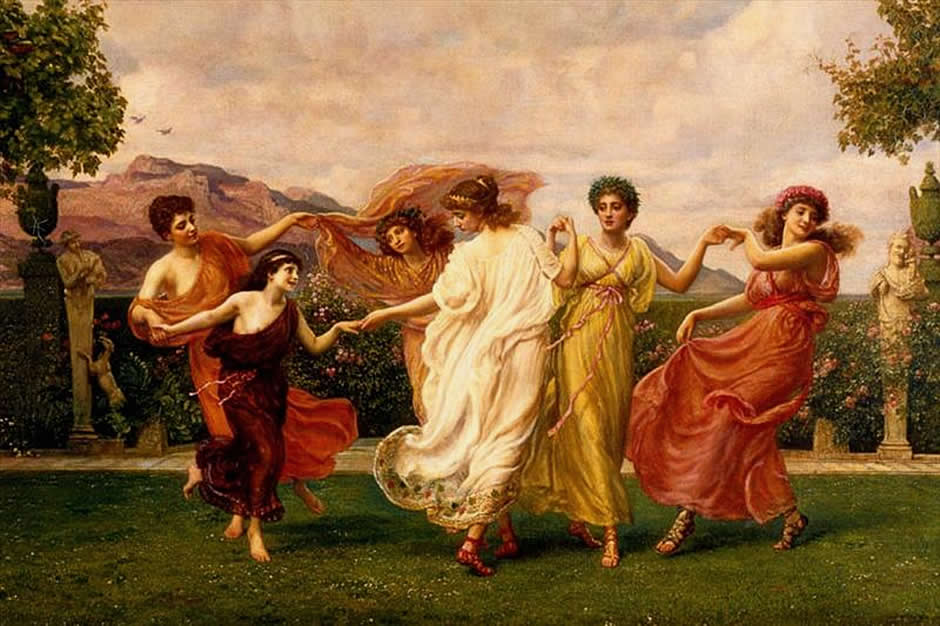 Horae Serenae